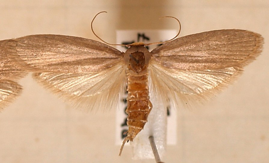 Achroia grisella